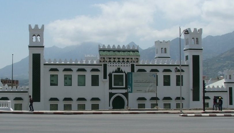 Antigua terminal del ferrocarril Ceuta-Tetuán. Restaurada en 2005 para albergar un museo de arte moderno